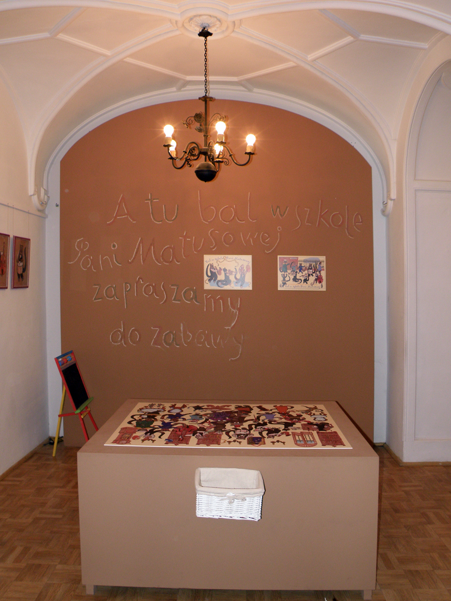 Warszawa, Muzeum Literatury - wystawa "Pimpuś Sadełko na 102"